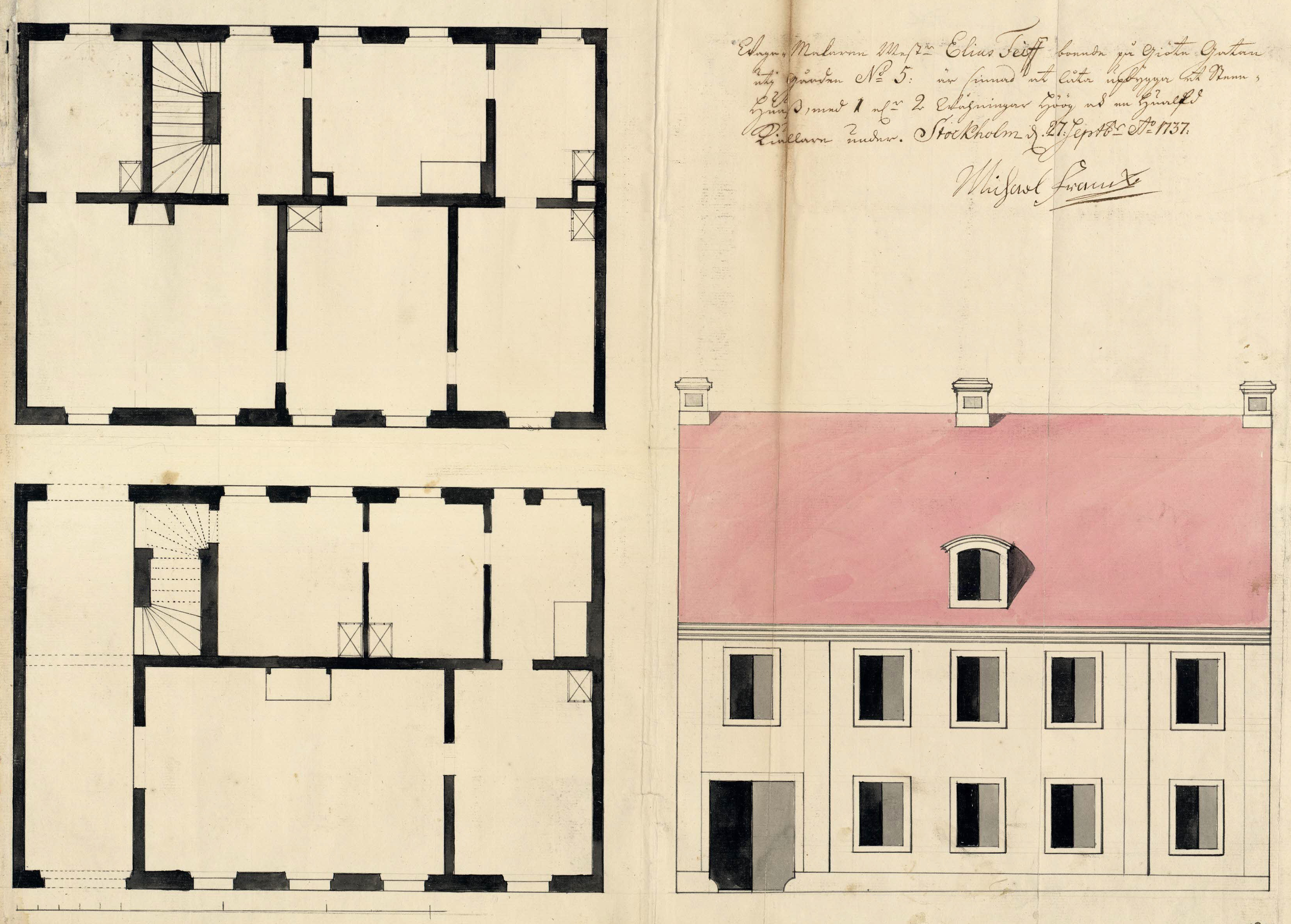 Bygglovsritning till första stenhuset på "Nederland 20"